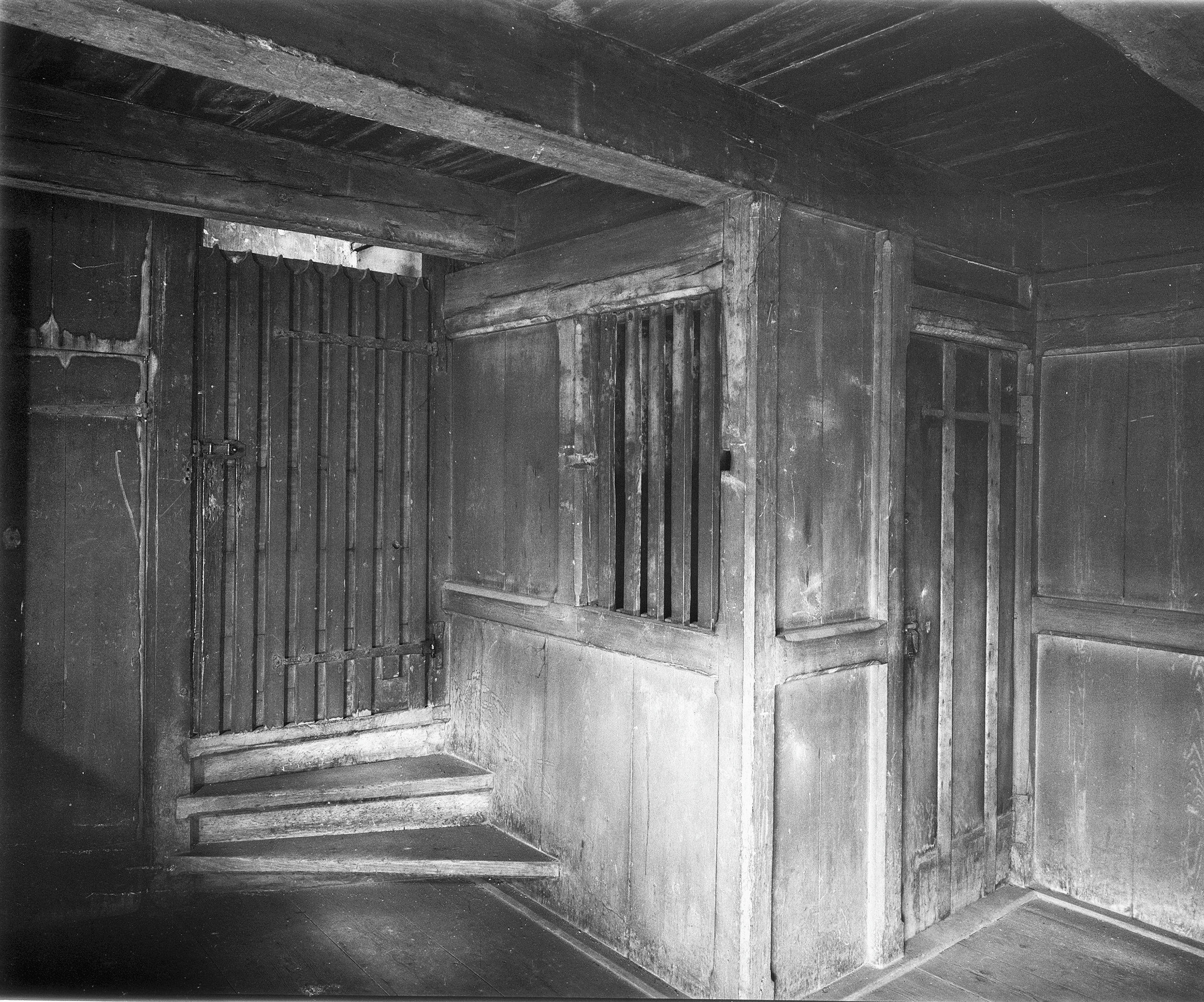 Lutherse Kerk: zo geheten Dolhuis boven koor